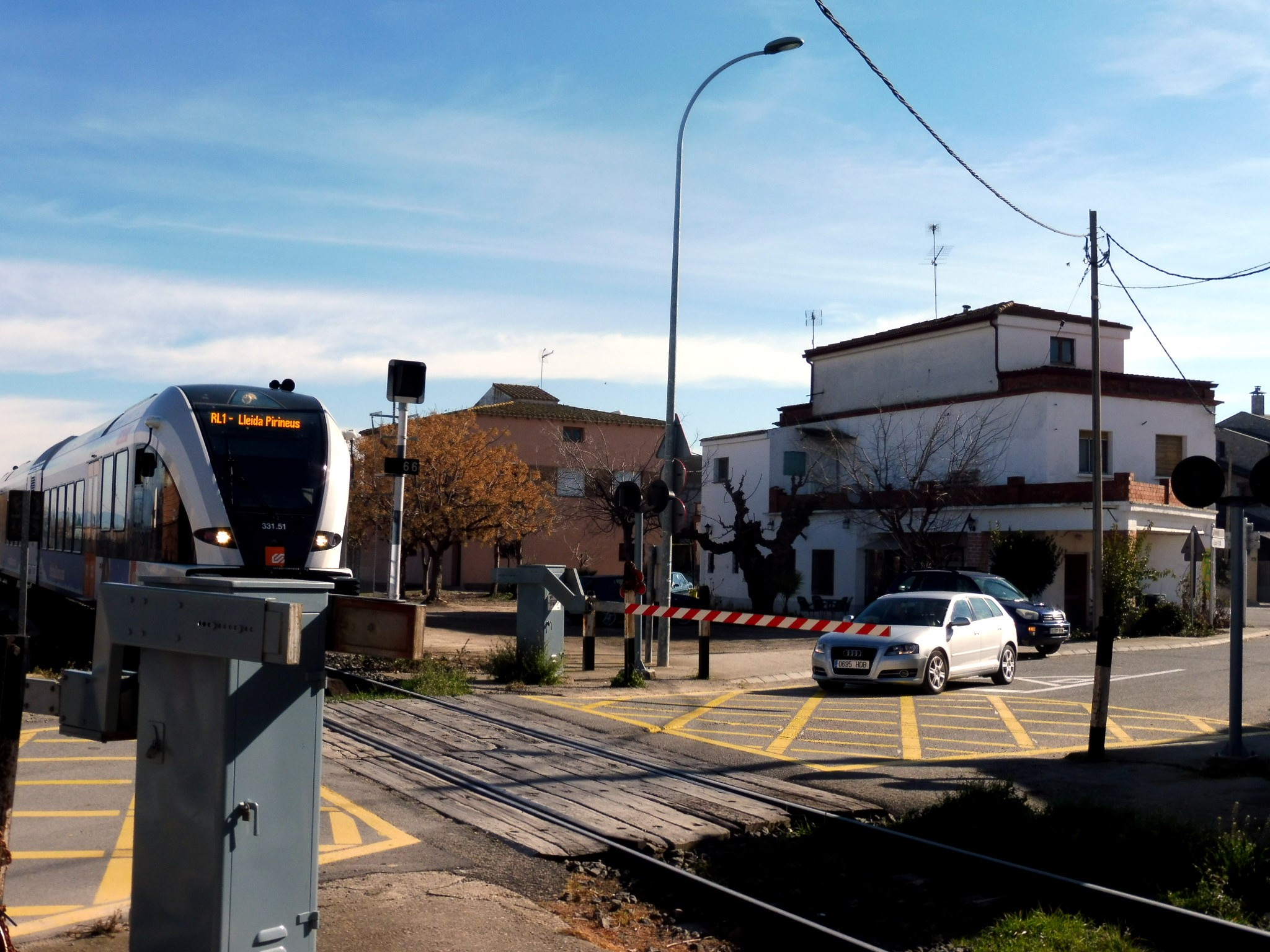 Estació de ferrocarril de Térmens